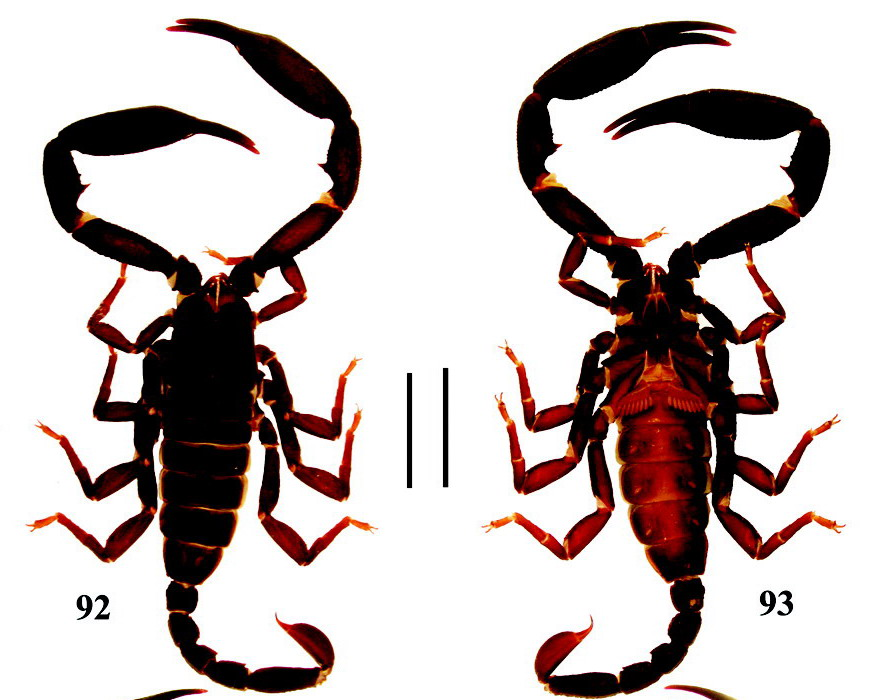 Euscorpiops xui